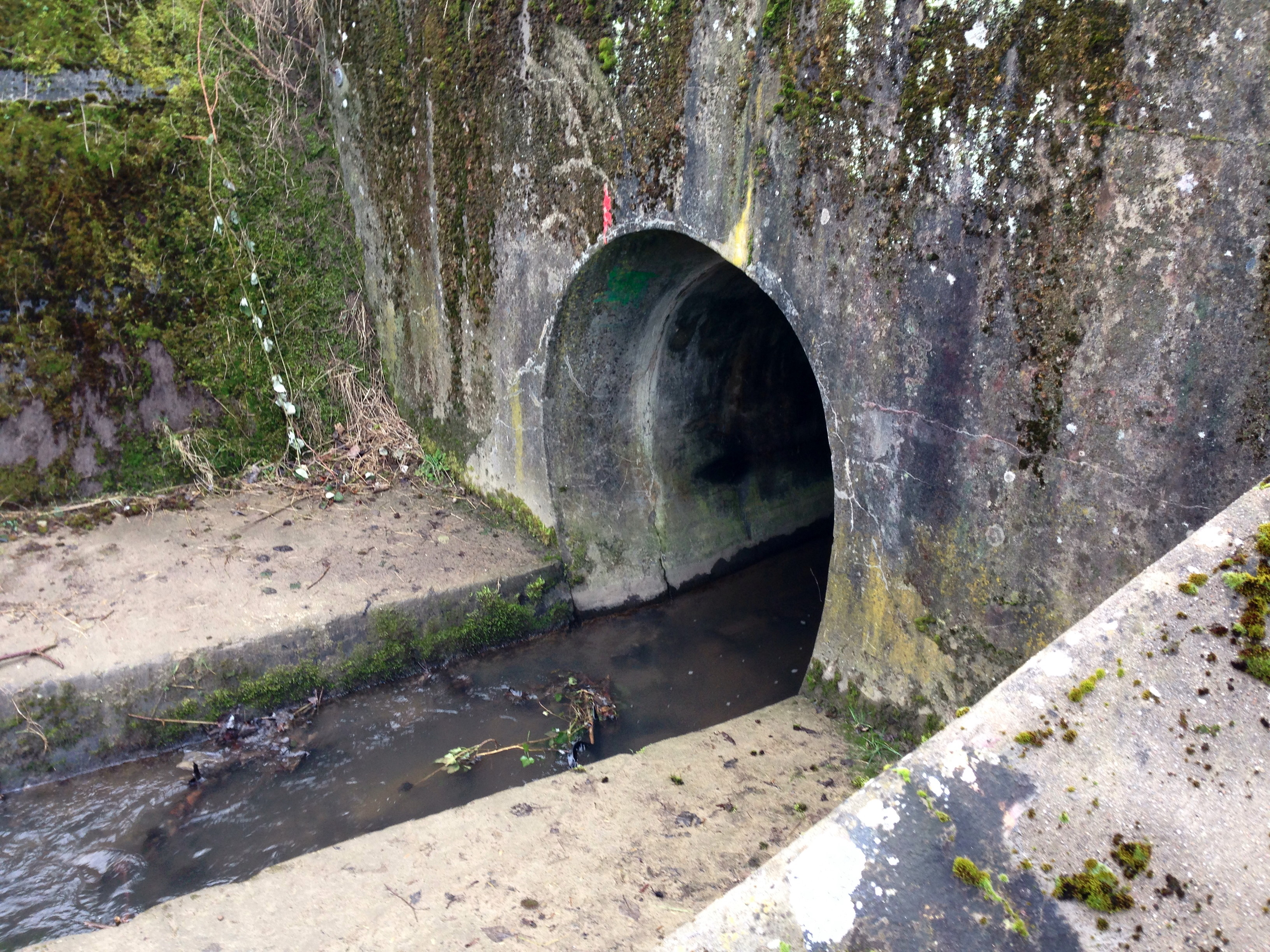 Austritt Endenicher Bach unterhalb Siemensstraße